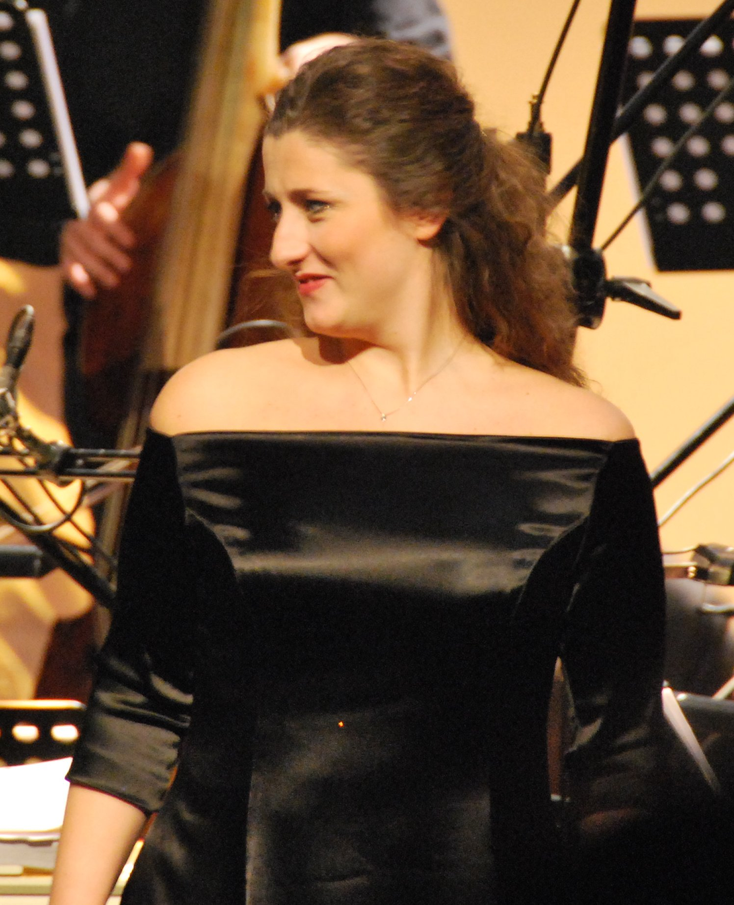 Maria Grazia Schiavo podczas koncertu w Teatrze im. Słowackiego w Krakowie w ramach festiwalu Opera Rara, 18.12.2009